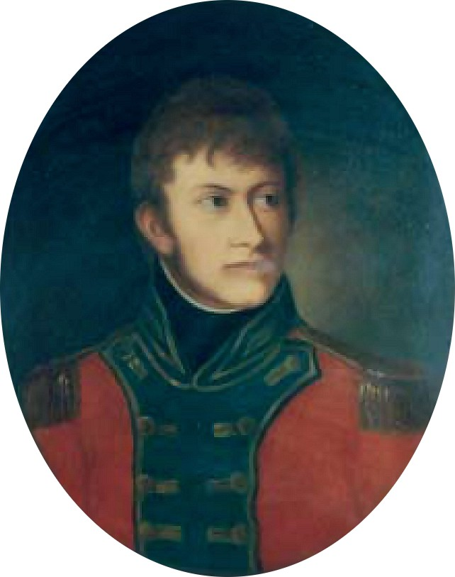 Ölgemälde mit dem Porträt des Grafen Wilhelm Ludwig Josef von und zu Westerholt und Gysenberg im Sitzungsfoyer des Kreishauses in Recklinghausen